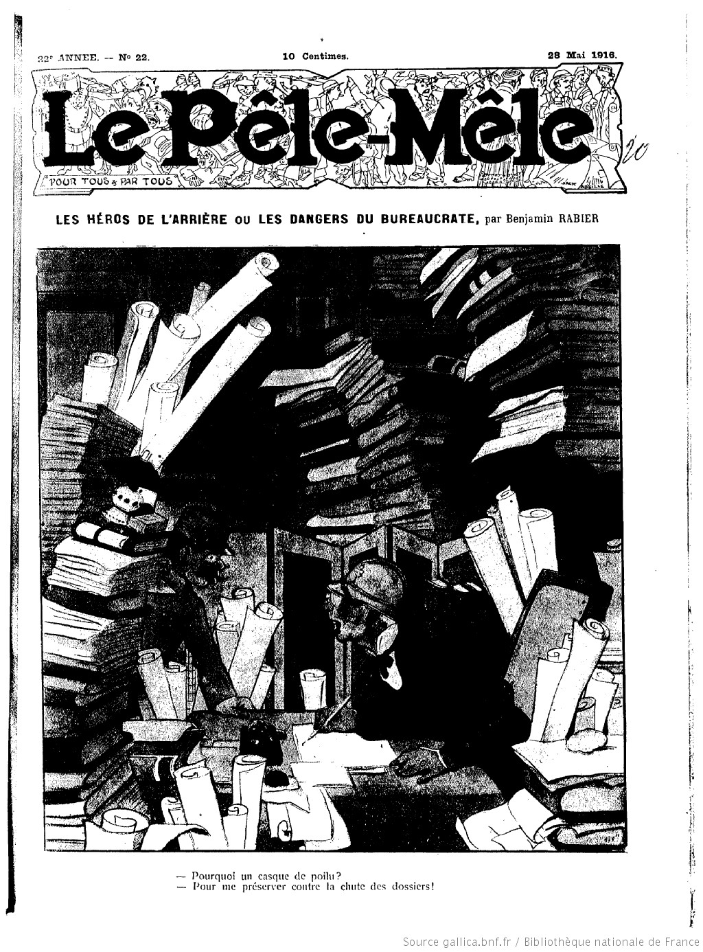 Les héros de l'arrière Pêle Mèle